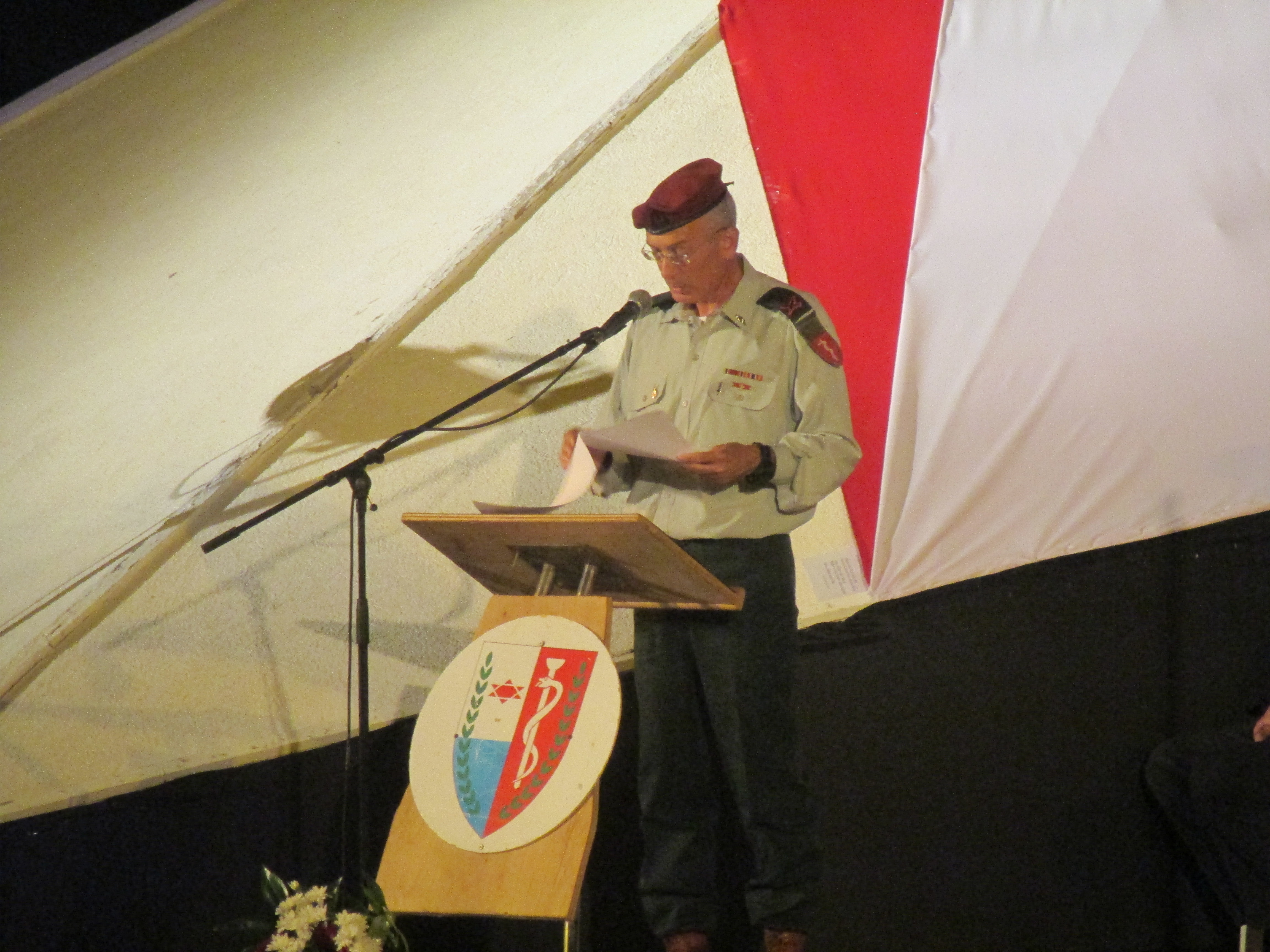 קצין רפואה ראשי תא"ל דודו דגן